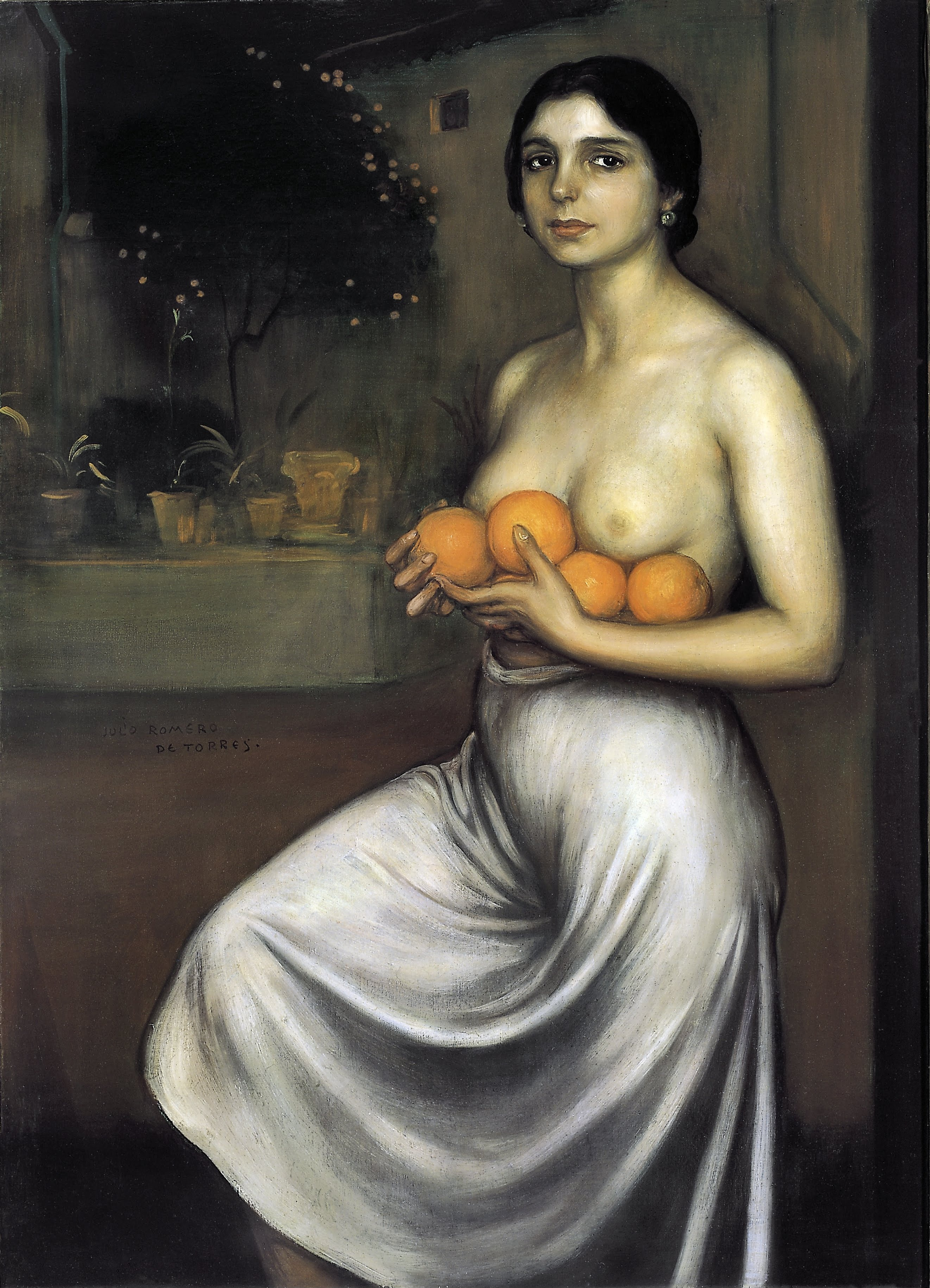 Naranjas y limones. 1927. Óleo y temple sobre lienzo. 104 x 74 cm. Museo Julio Romero de Torres, Córdoba, (España).